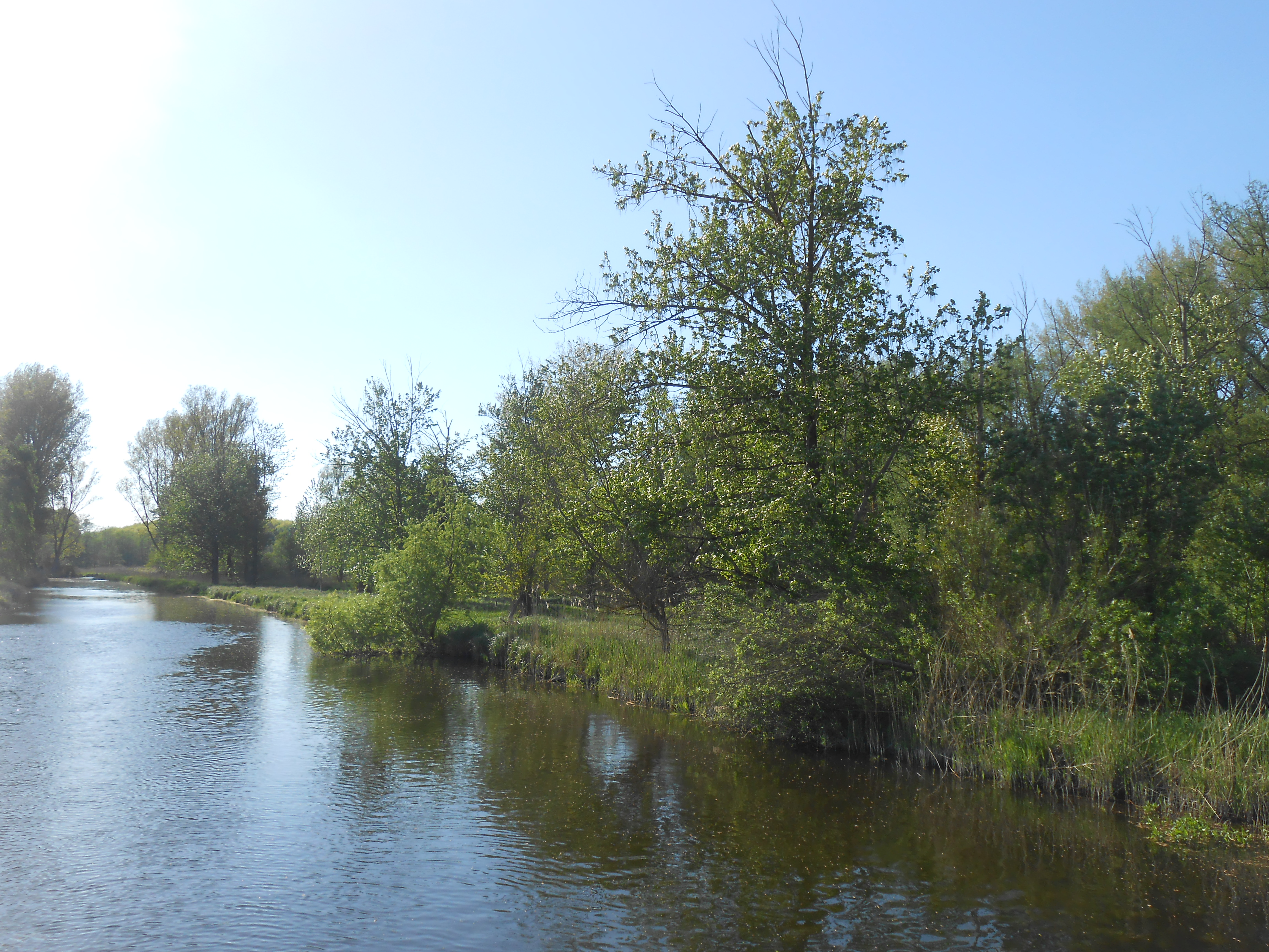 Der Blick von der Grünen Brücke auf die Trave.